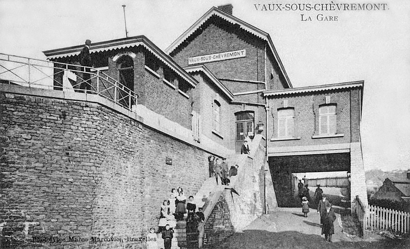 En Belgique, la gare de Vaux-Sous-Chèvremont située sur la ligne 38.